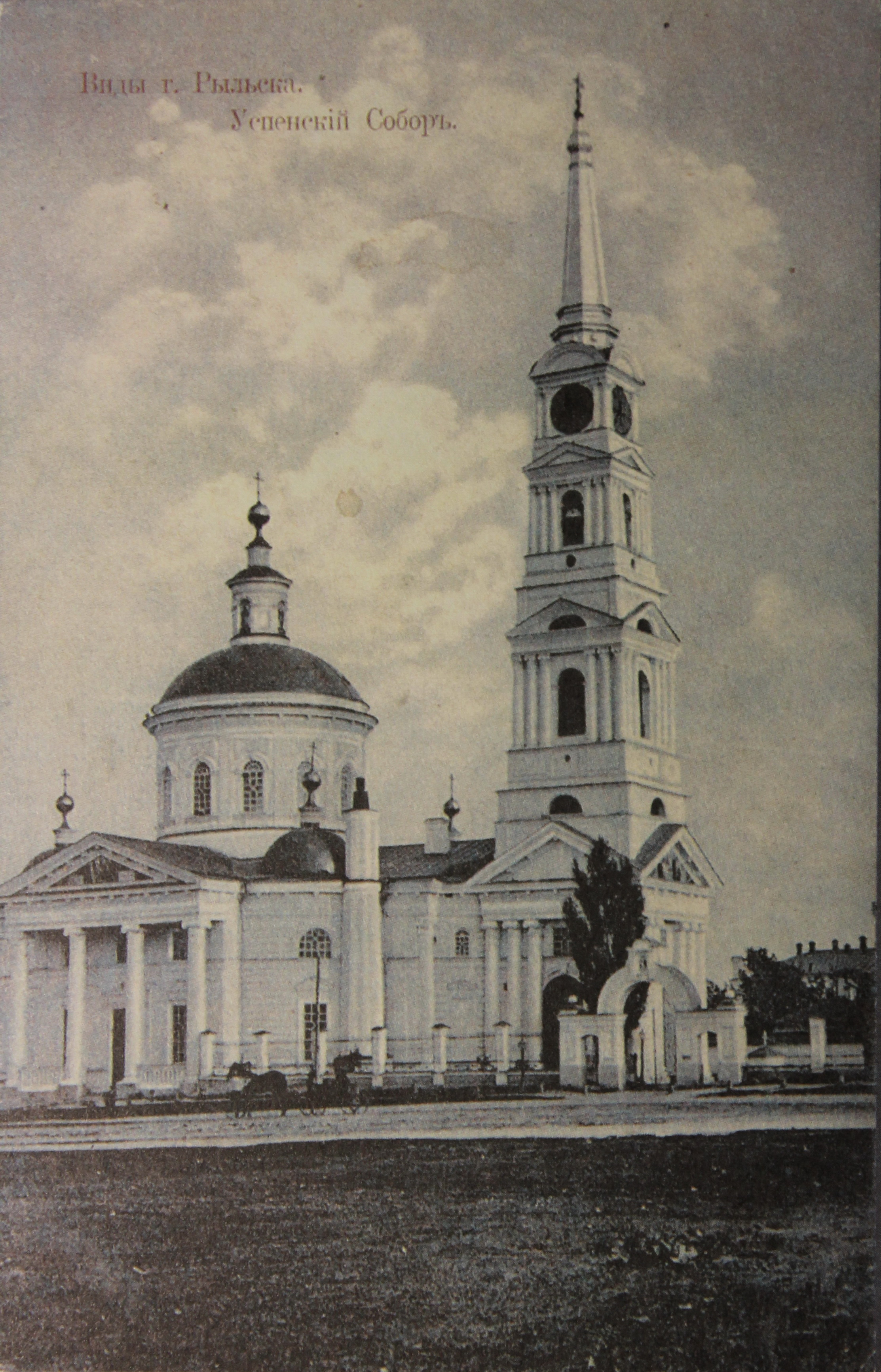 Кафедральный собор Успения Пресвятой Богородицы в Рыльске. Дореволюционная открытка